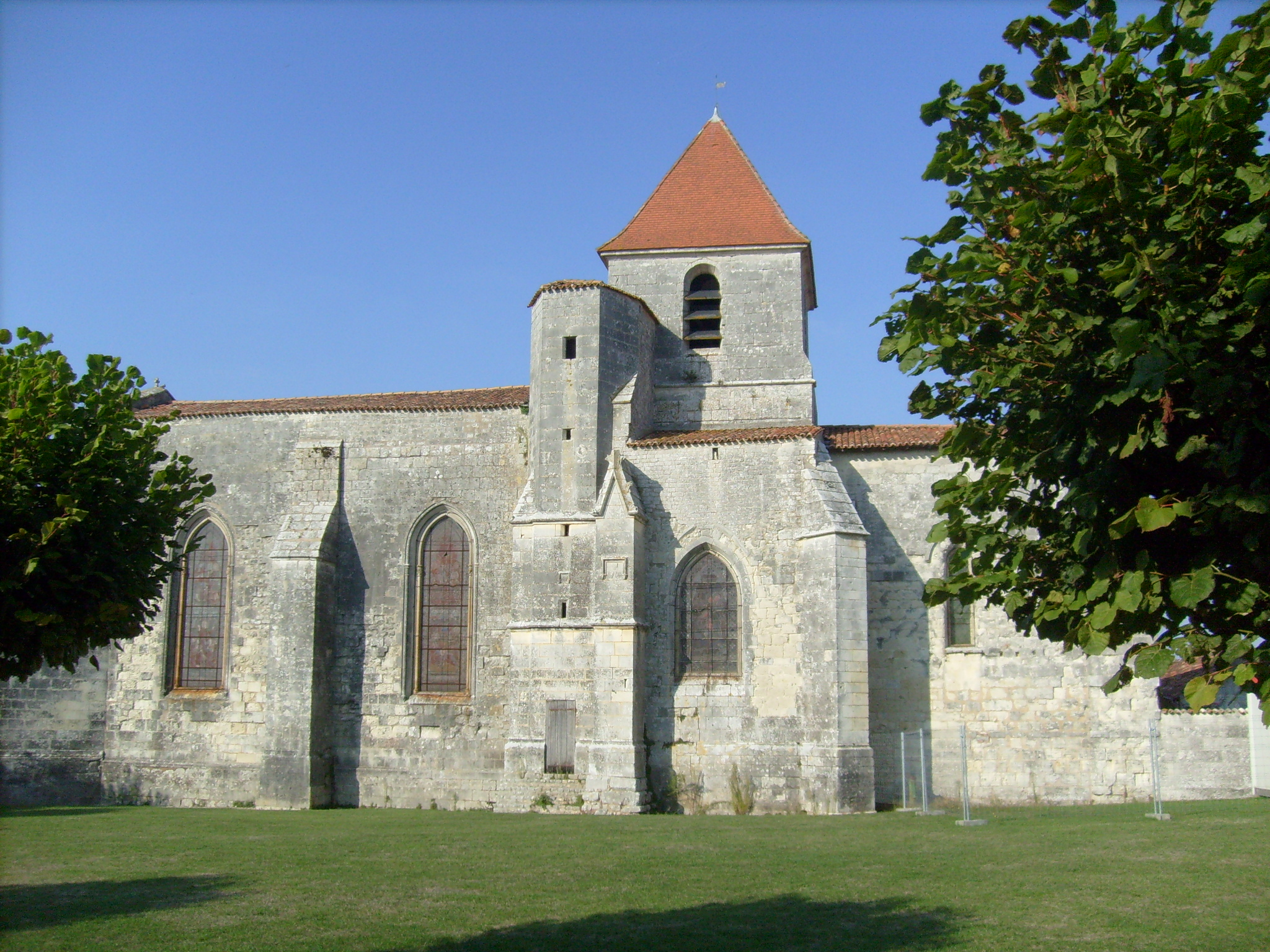 L'église de Saint-Georges-des-Coteaux